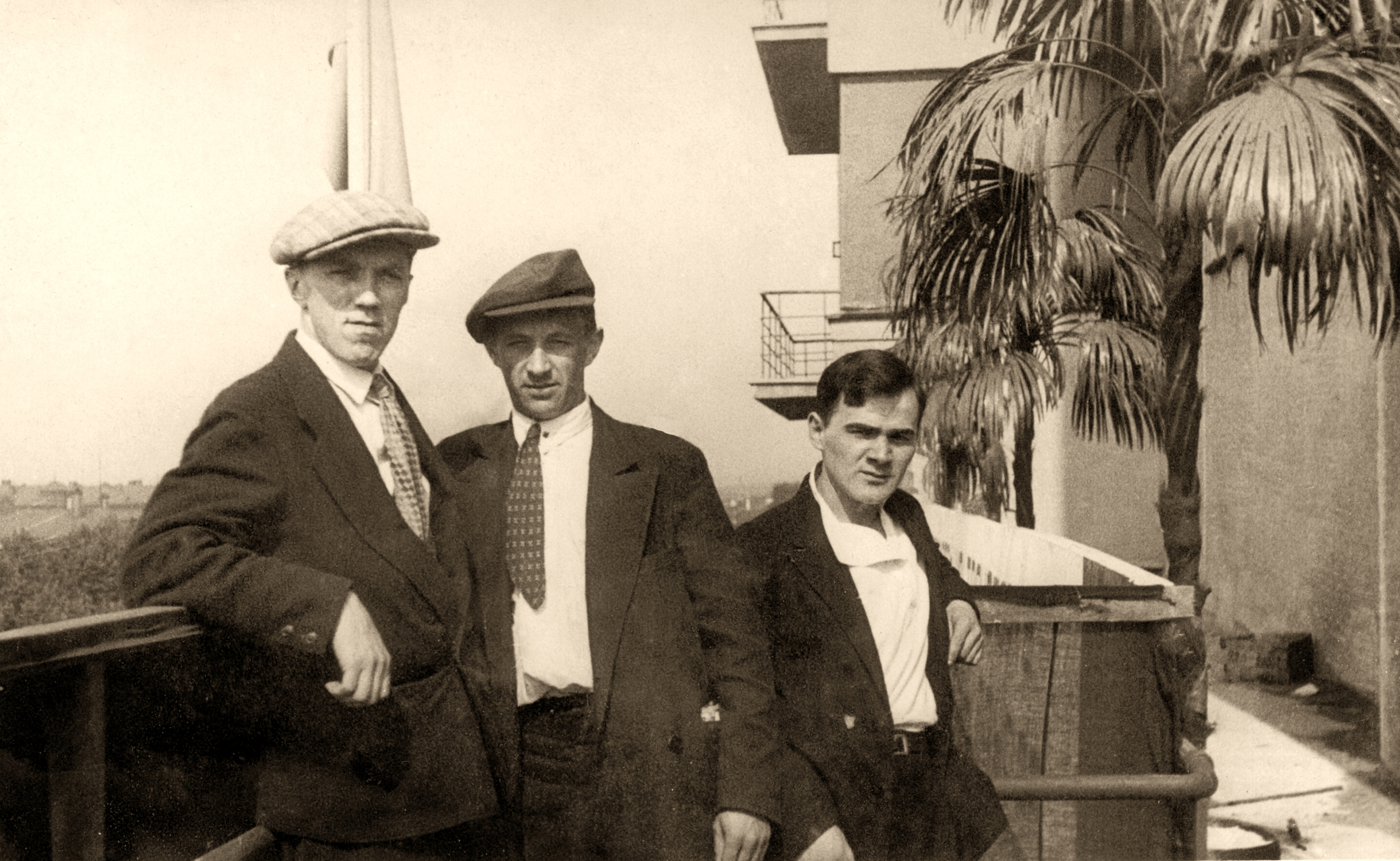 C. И. Маркин с другими художниками, 1934 год.